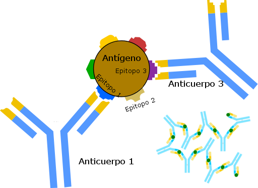 Interacción antígeno anticuerpo. Formación del complejos antígeno-anticuerpo